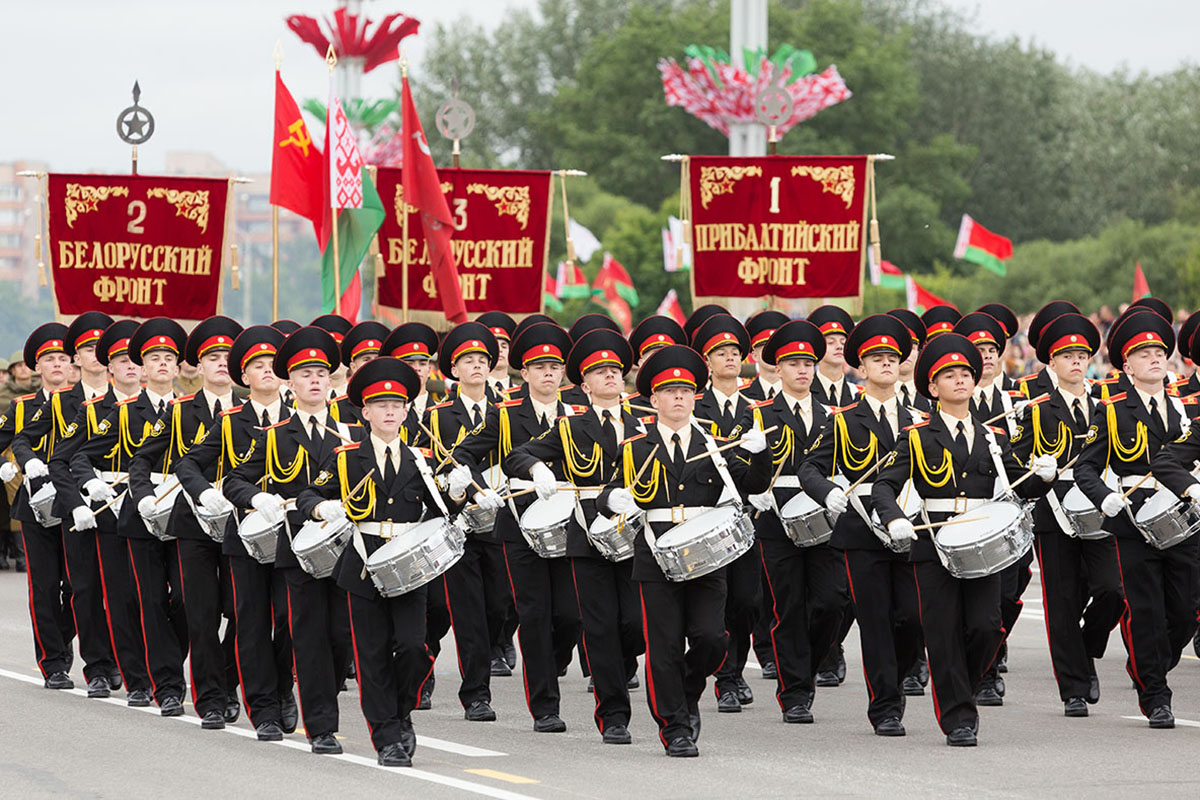 Парад по случаю Дня независимости Белоруссии при участии авиации ЗВО